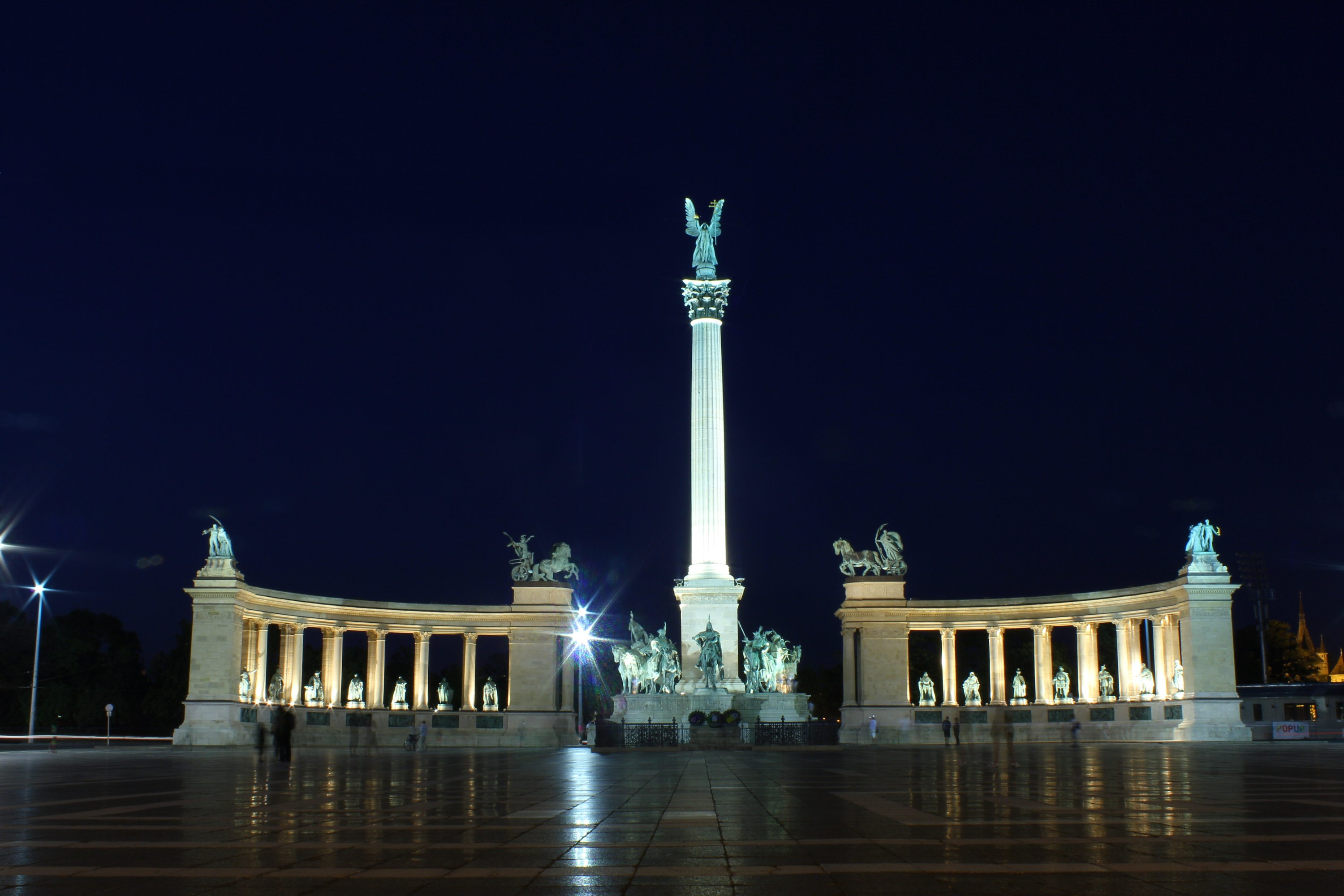 Millenniumi Emlékmű This is a photo of a monument in Hungary. Identifier: 1228